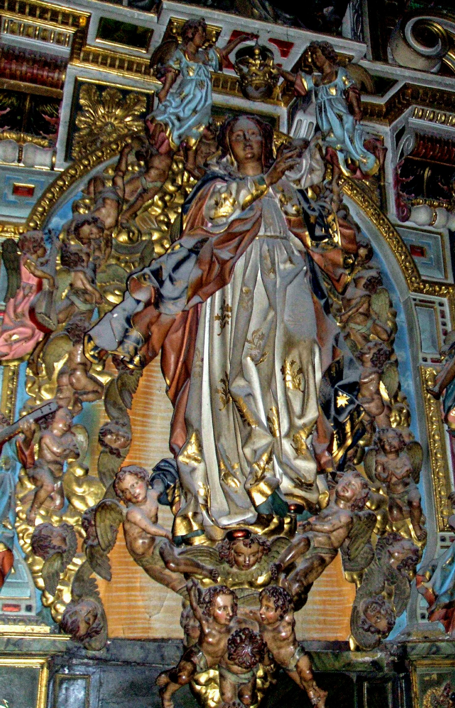 Talla de la Virgen de la Asunción (Catedral Ourense)